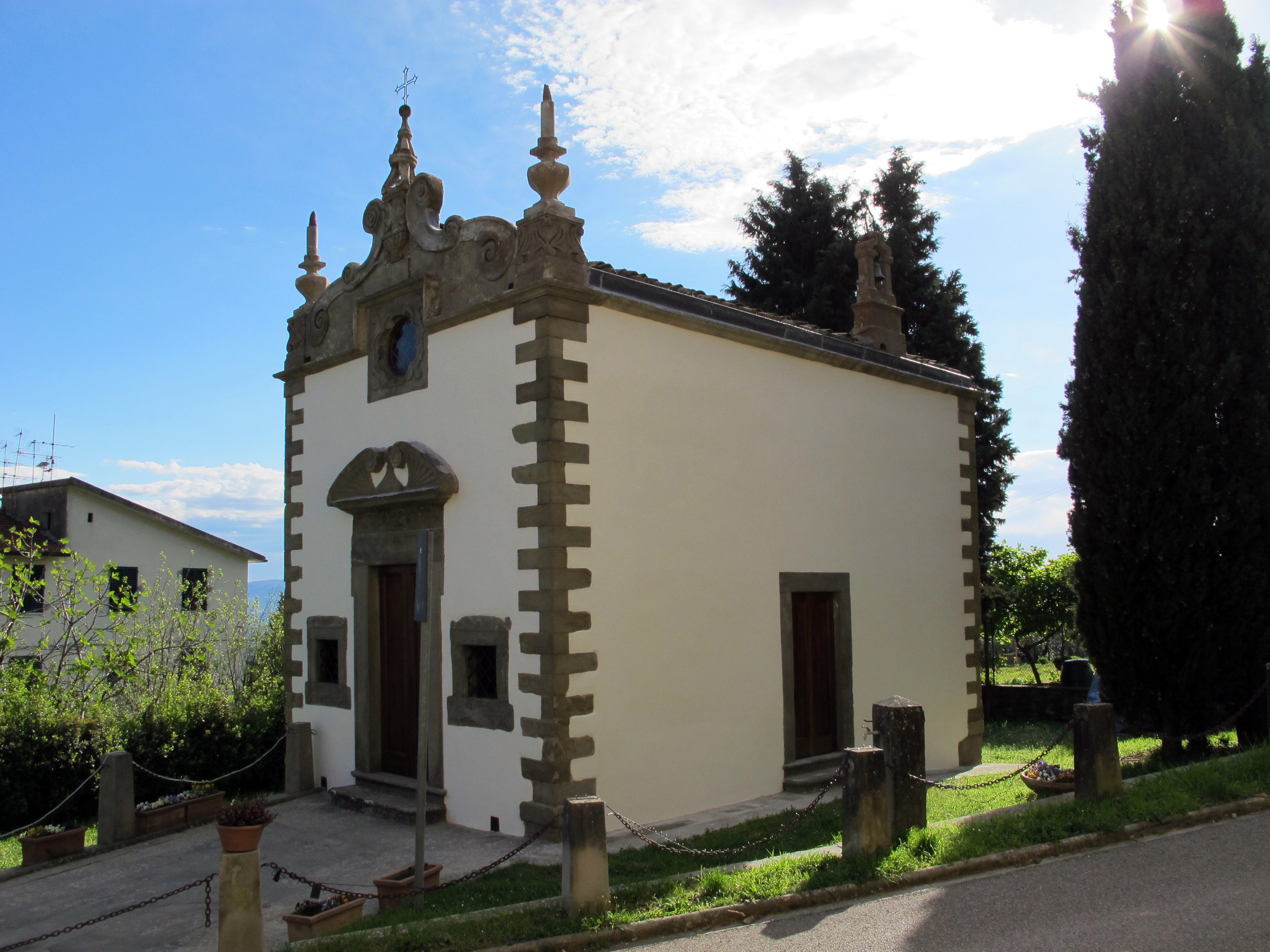 Pian di Scò